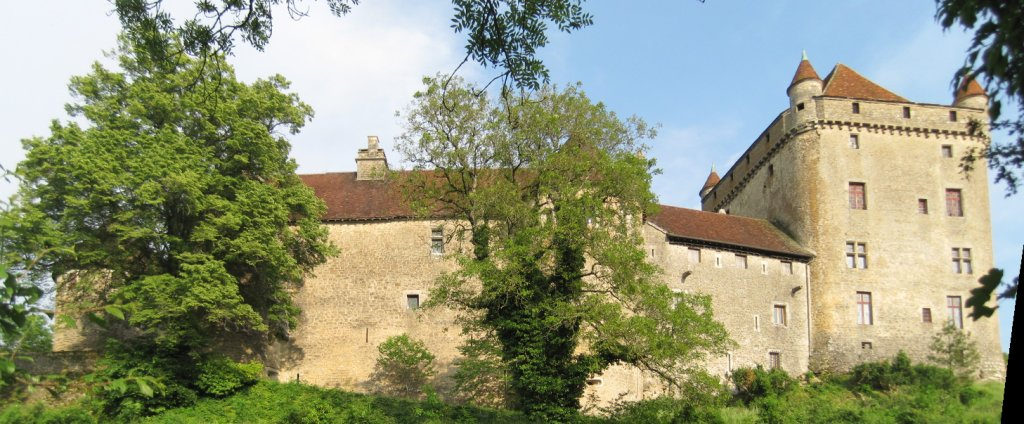 Panoramique Château du Pin - Jura - Franche Comté